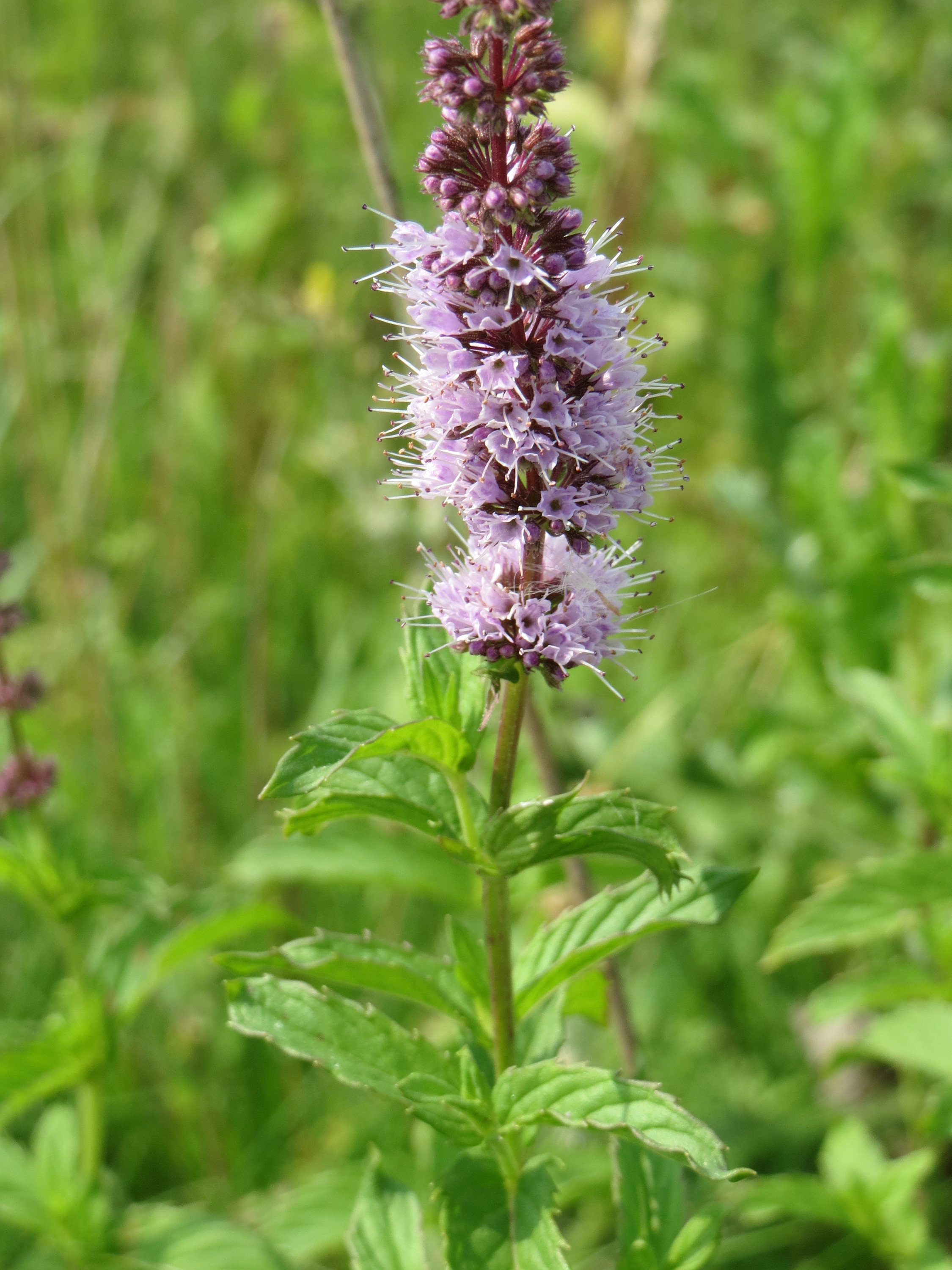 Grüne Minze (Mentha spicata) am Kriegbach bei Neulußheim (Gemarkung Altlußheim)